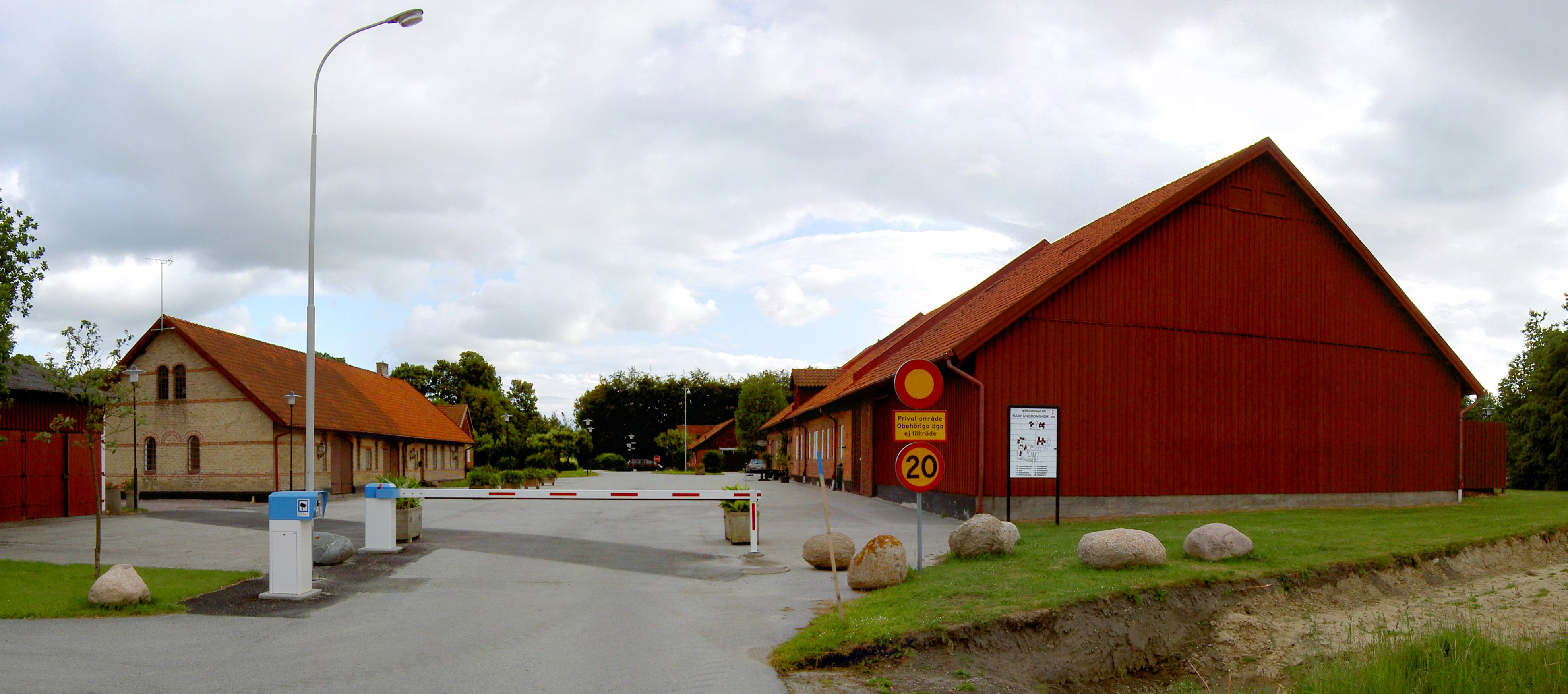 Råby ungdomshem, Lund. Hopskarvad med Autopano Pro